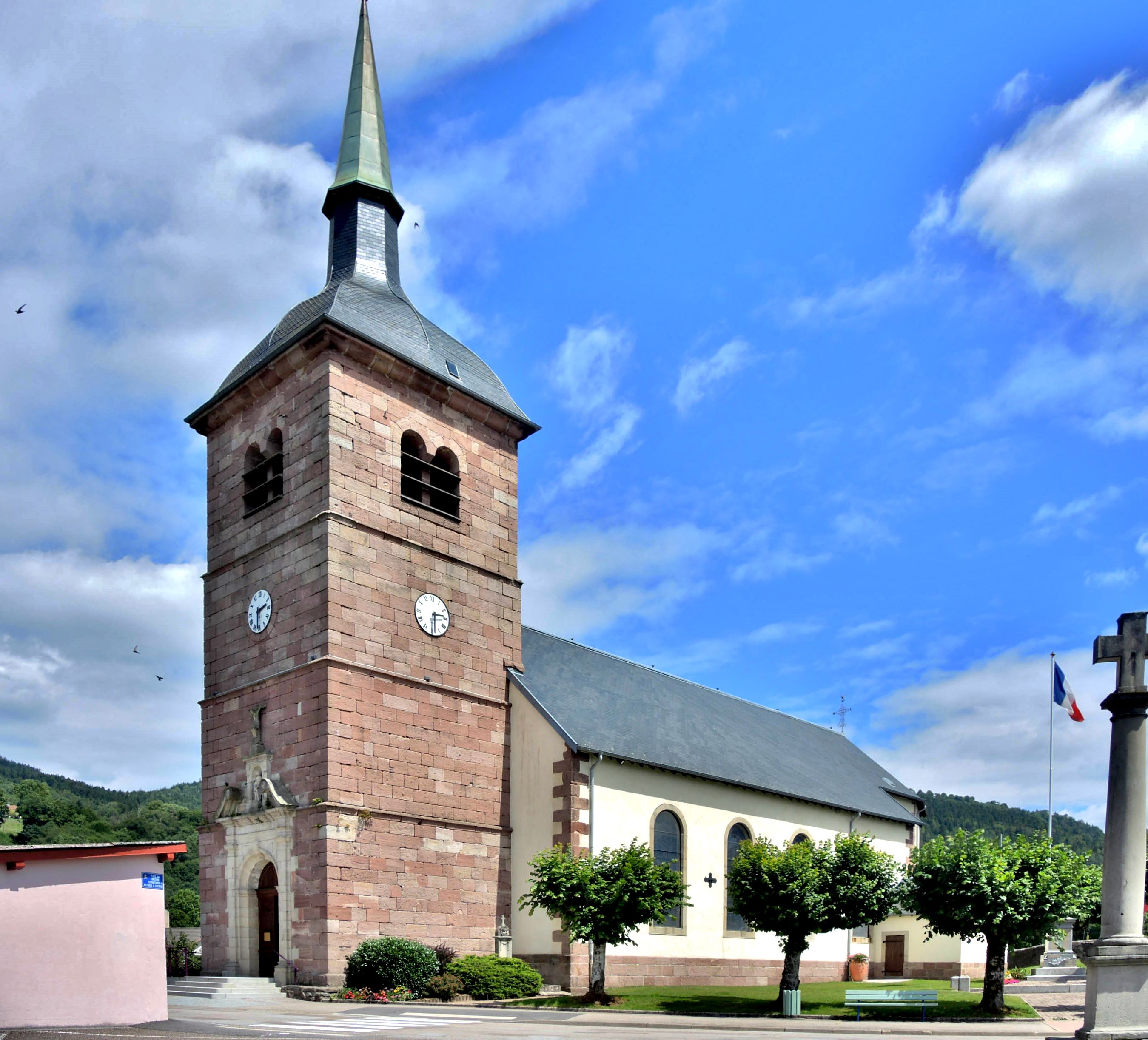 Eglise de l'Invention, à Saint-Etienne-lès-Remiremont. Vosges